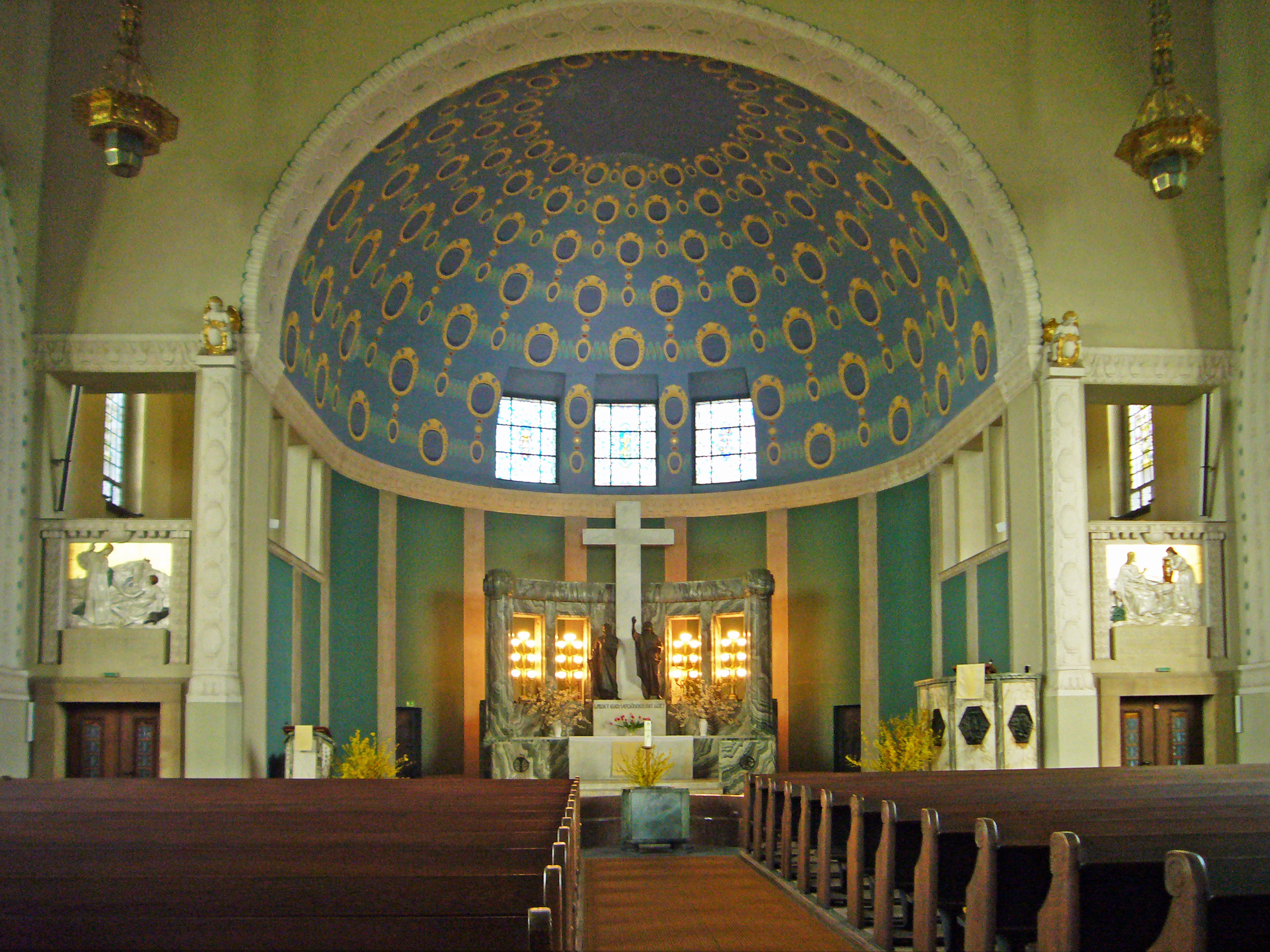 Dresden-Strehlen, Christuskirche, innen. Blick zum Altar mit den Skulpturen des Hl. Paulus und Hl. Johannes von August Hudler